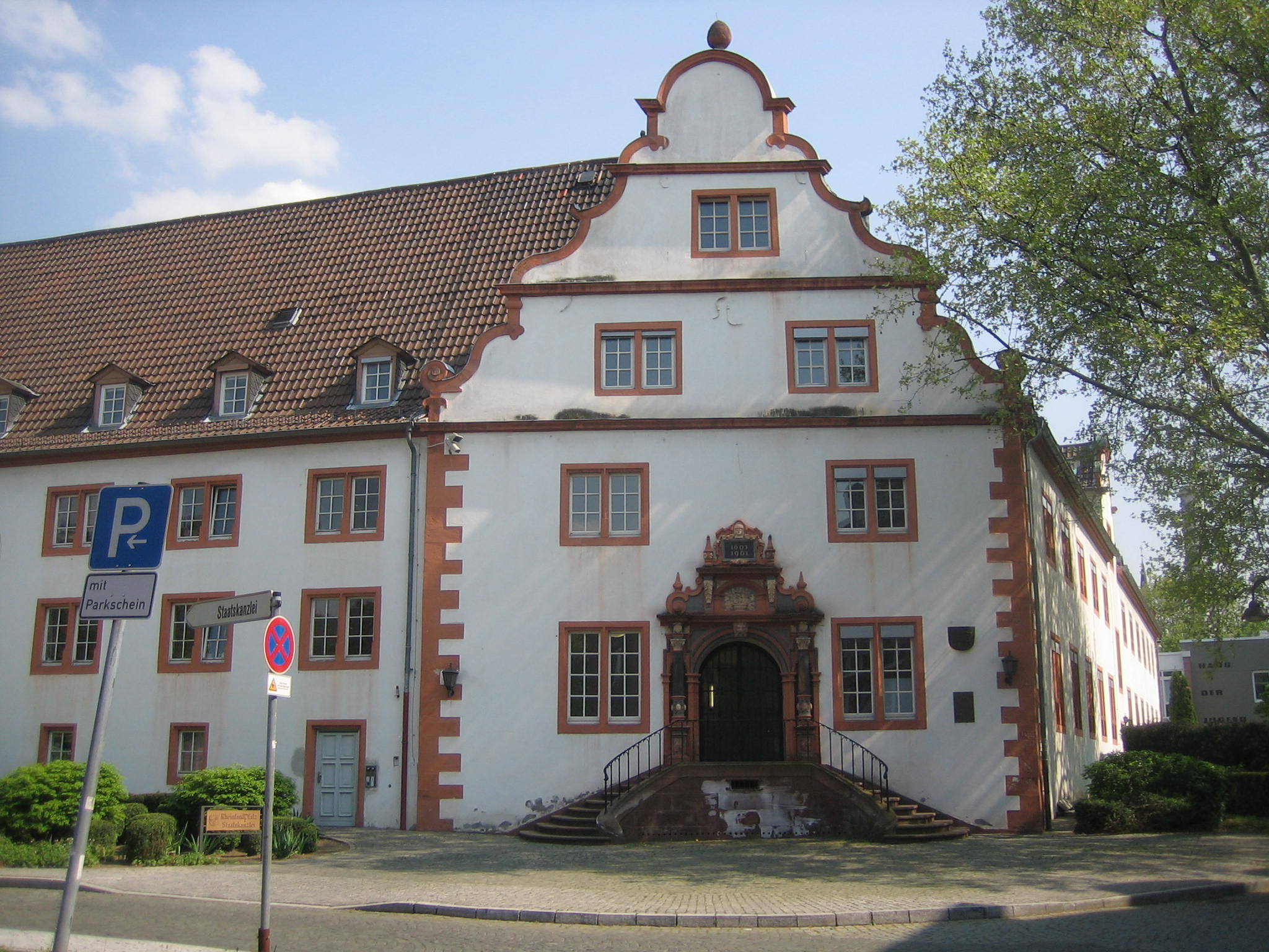 Portal des Alten Zeughauses Mainz, vom Deutschhausplatz aus gesehen.